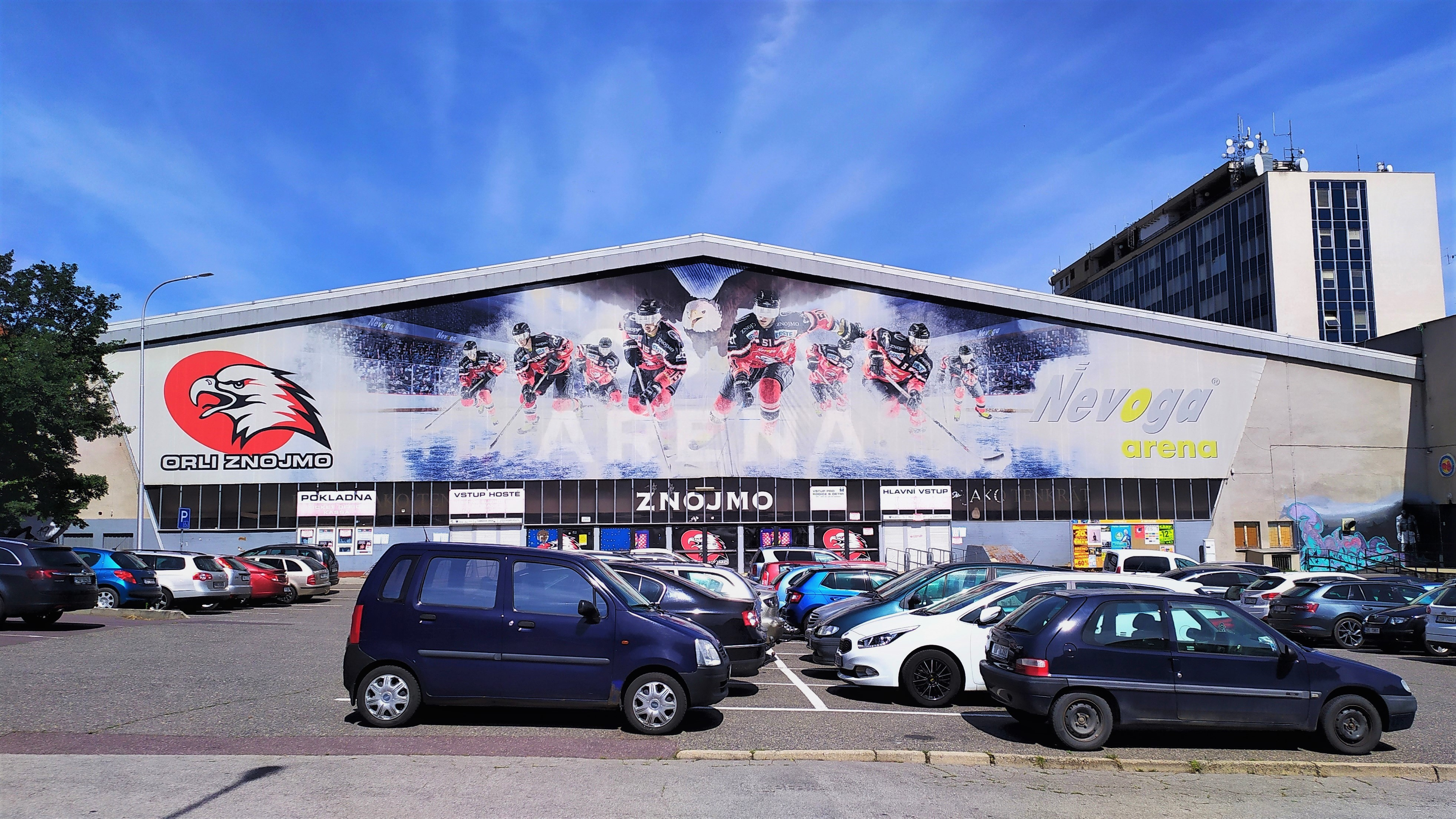 Fotografie Nevoga Areny